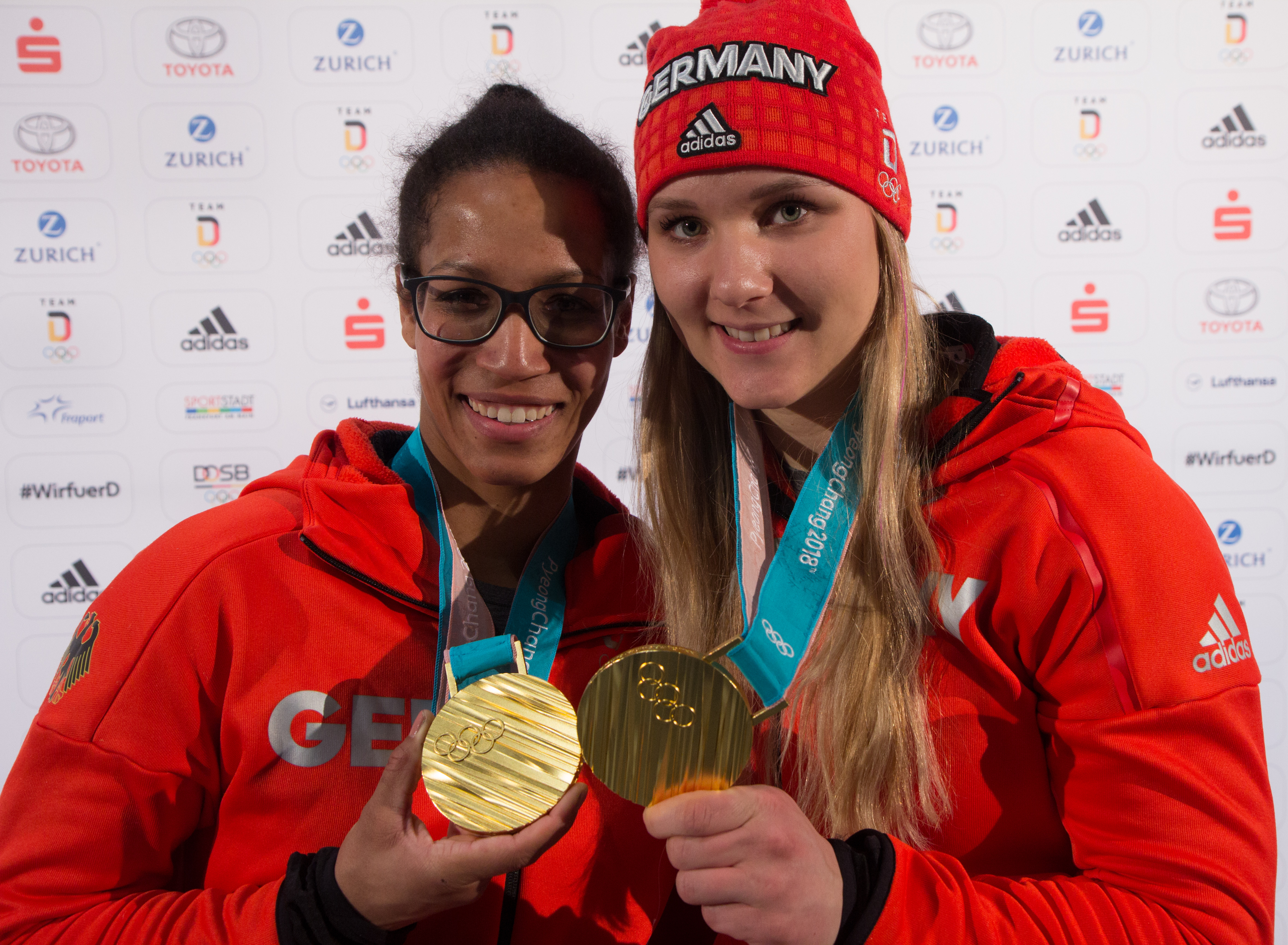 Ankunft der deutschen Olympiamannschaft am 26. Februar 2018 mit Flug LH713 auf dem Frankfurter Flughafen.